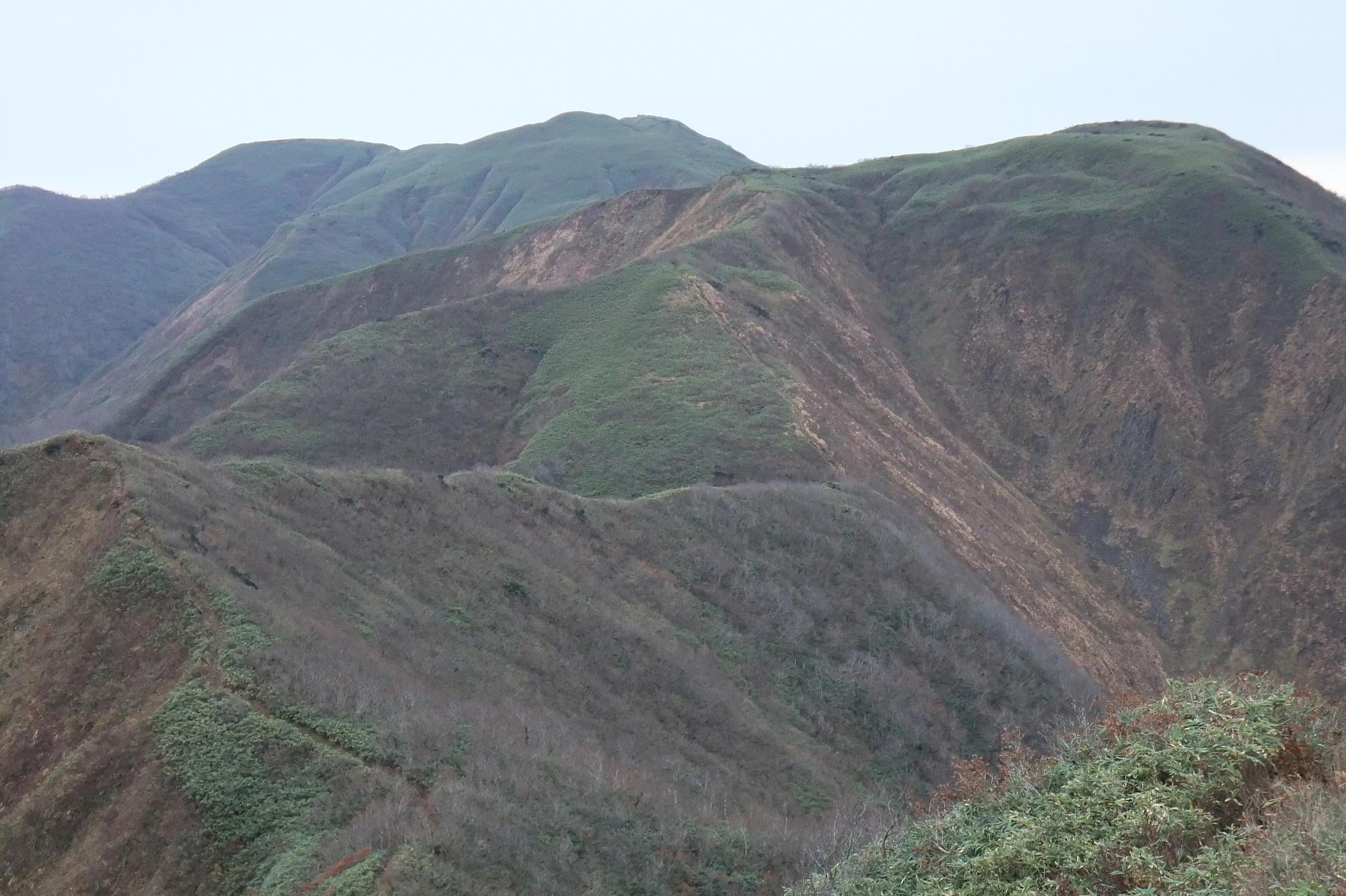 北ノ又岳から見た真昼岳 中央右の山上に山小屋がある山が真昼岳